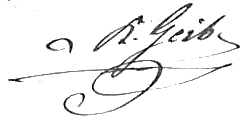 Signatur Karl_Gustav_Geib